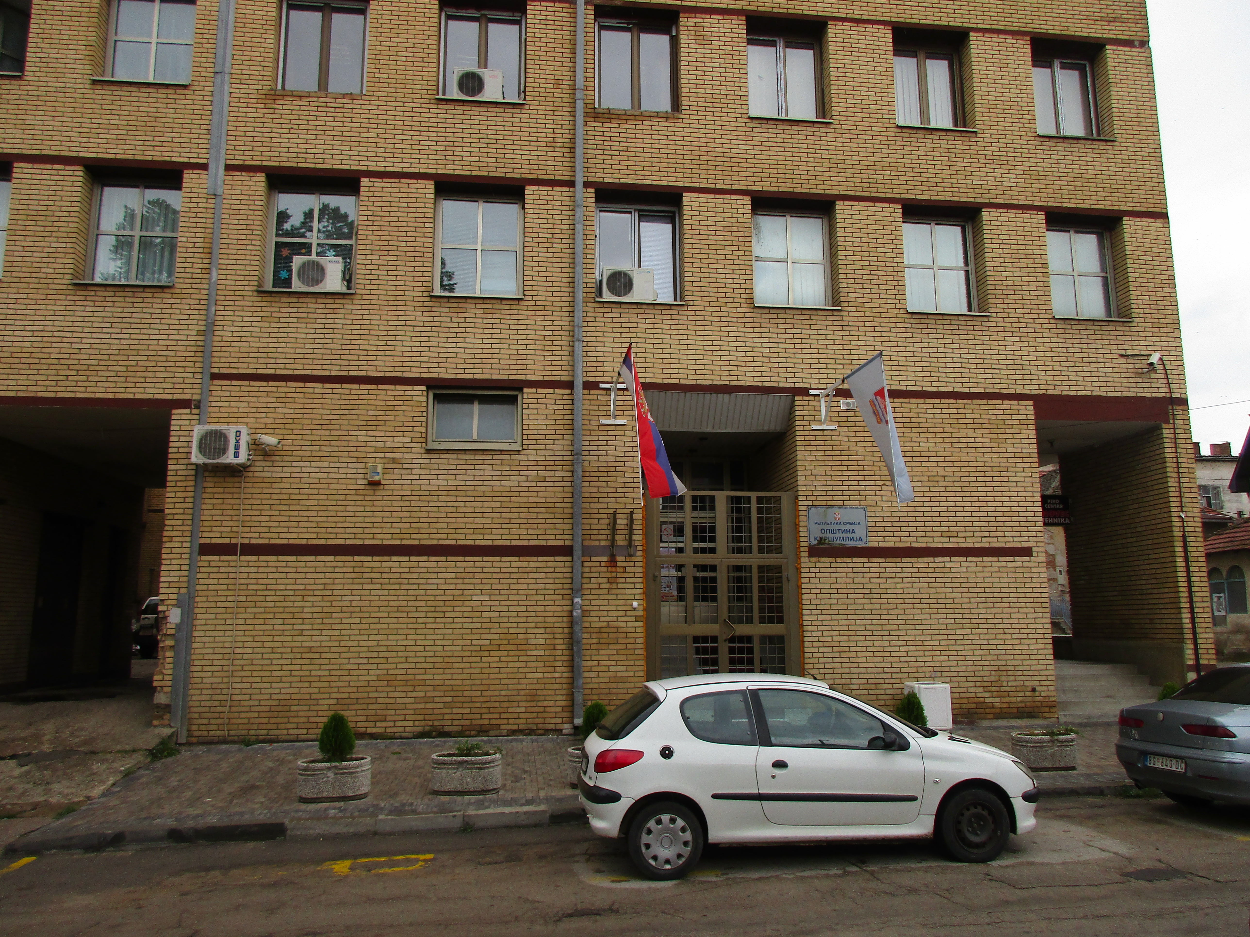 Srpski (latinica): Opština Kuršumlija